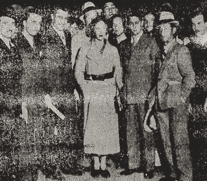 Helle Nice chega à cidade de São Paulo em 2 de julho de 1936.